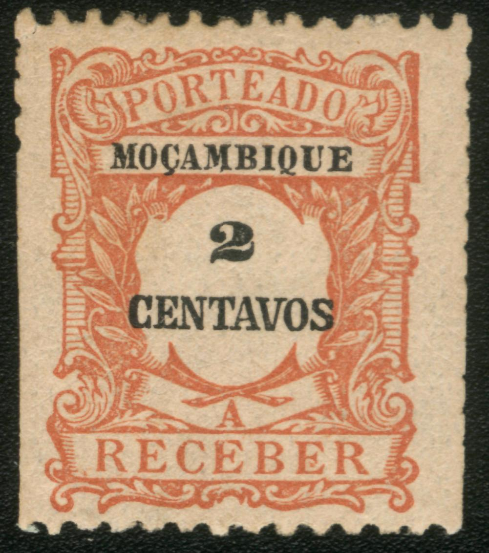 Португалия. Почтовая марка для колоний без номинала и названия колонии. Надпечатка "Мозамбик" и номинала 2 сентаво.